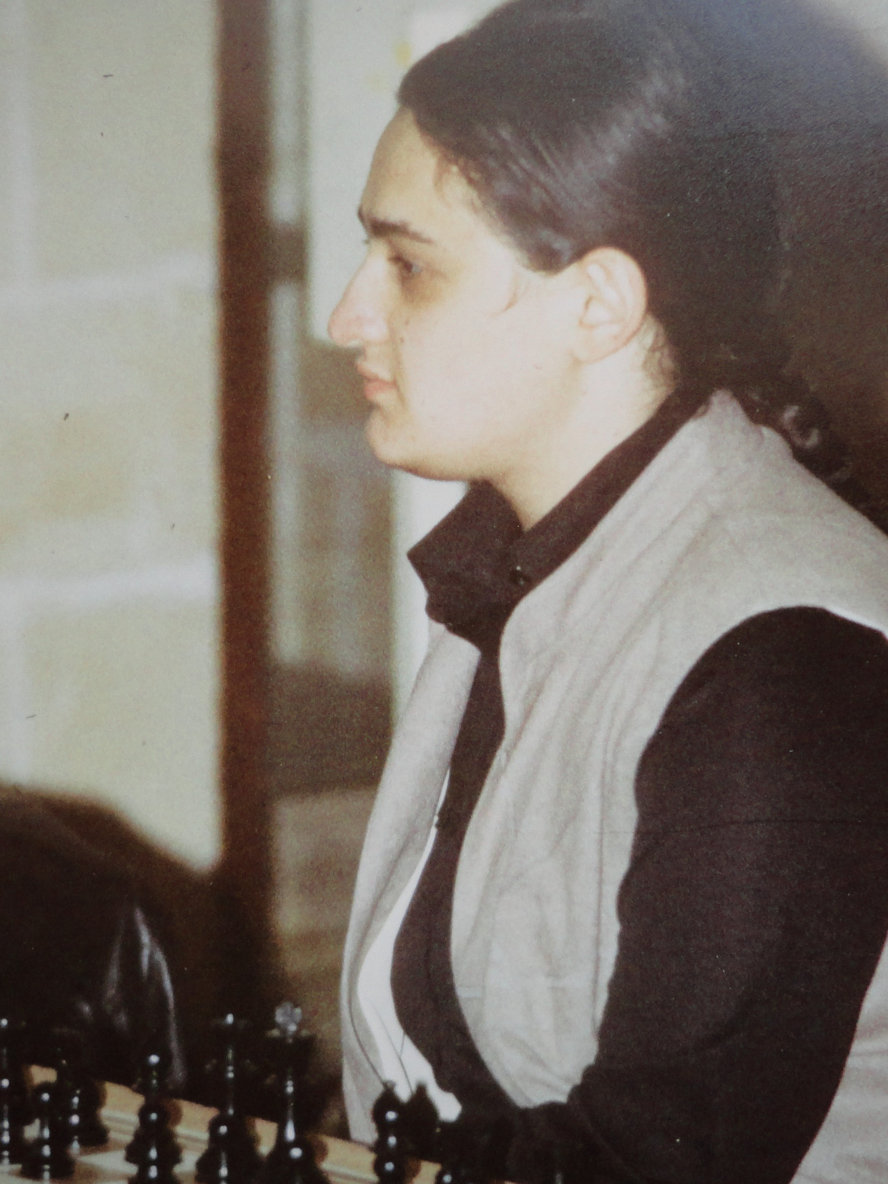 Maia Chiburdanidze, Schacholympiade 1980 in Valletta auf Malta.